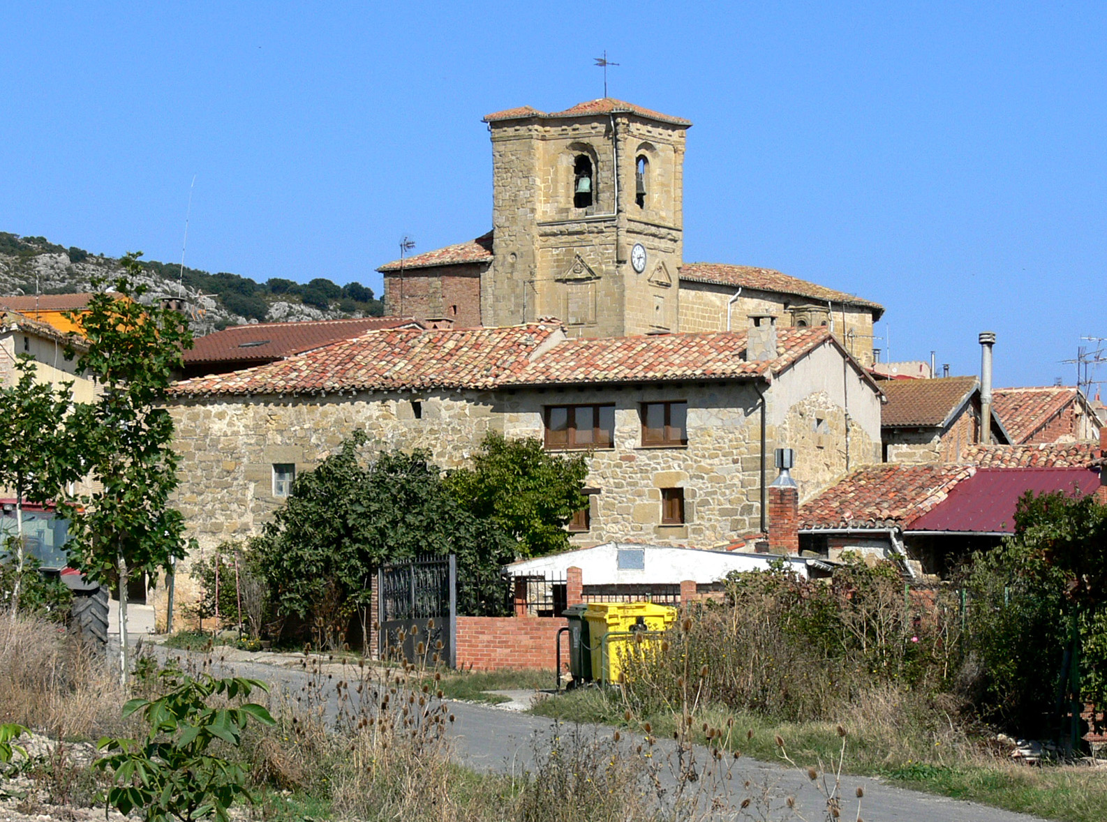 Iglesia de San Miguel en Foncea, La Rioja - España.